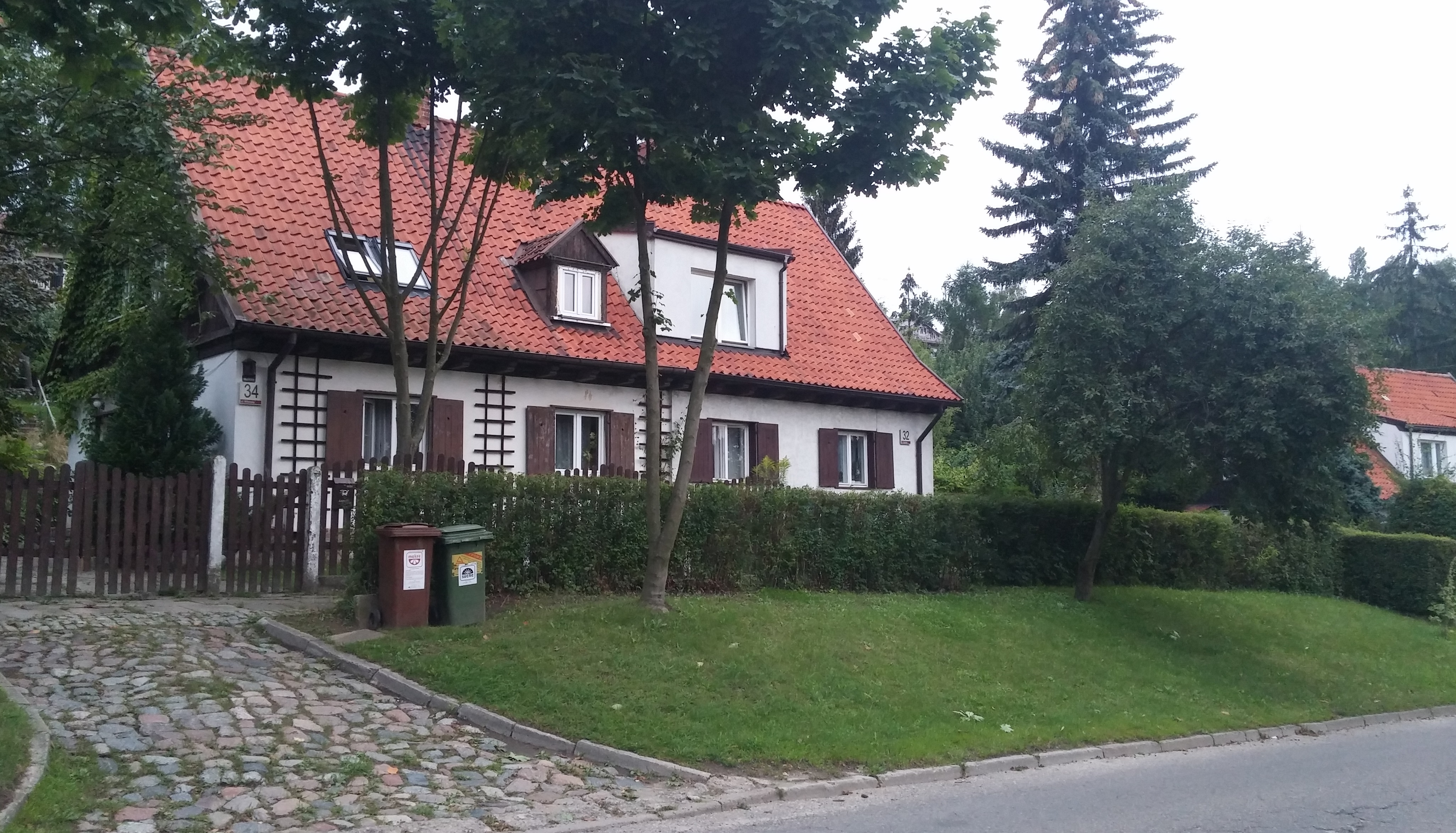 Jeden z domów przy ulicy Wileńskiej (nr 34).